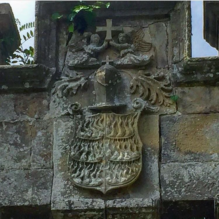 Escudu d'armes de Cienfueos nel Palaciu de Valdecarzana en Muros.